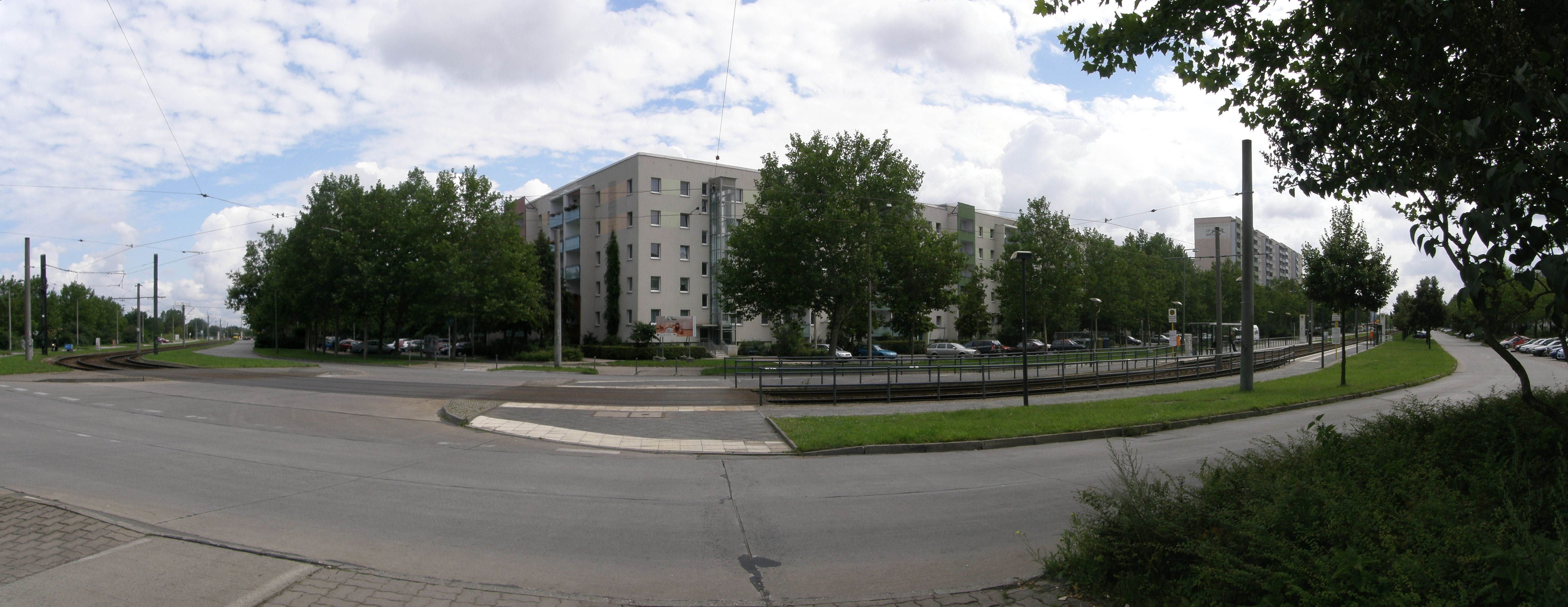 Hellersdorf, Zossener Straße, Panorama am Ostknick